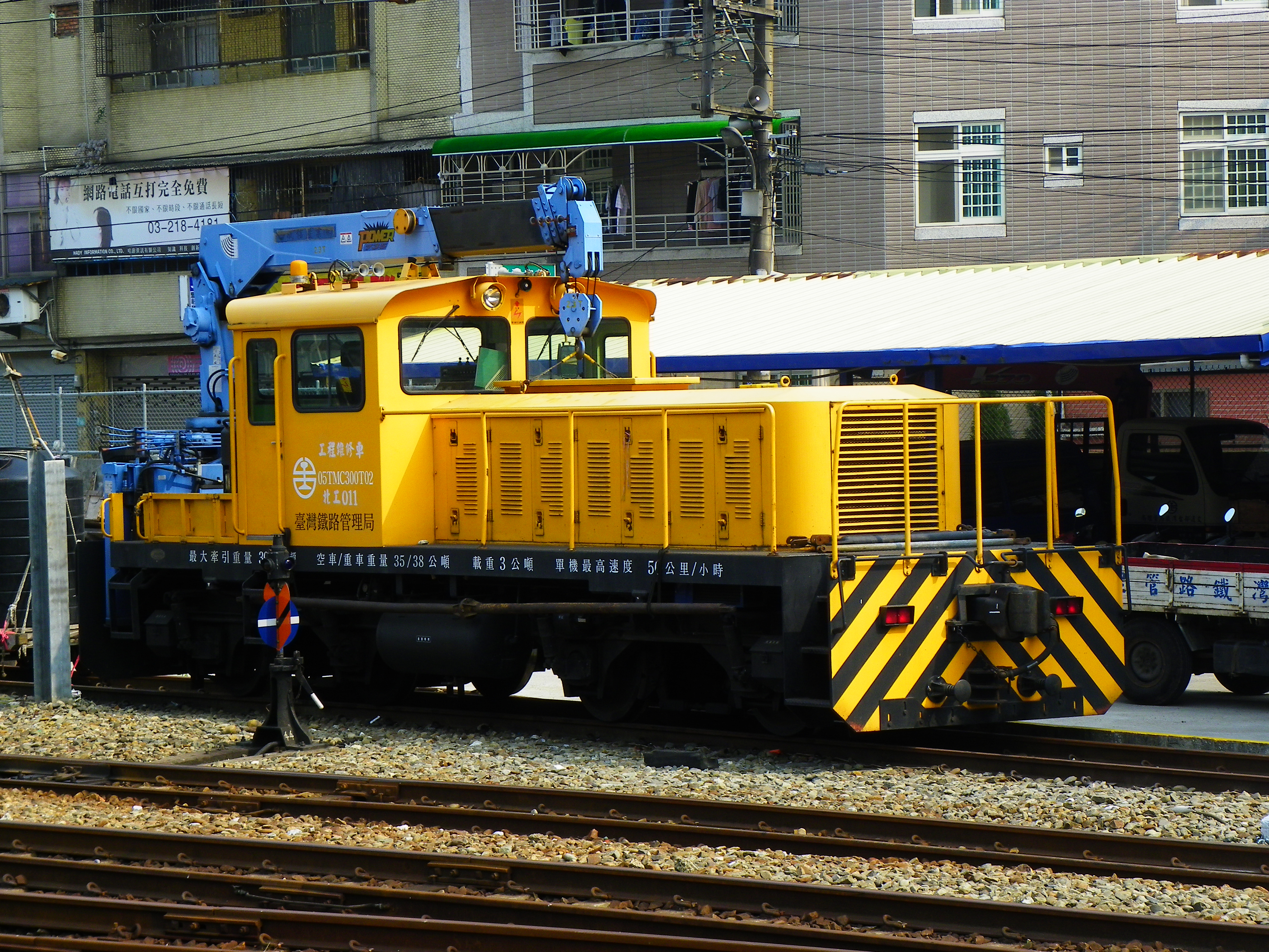 臺灣鐵路管理局工程維修車05TMC300T02（北工011），南韓成信産業（SUNGSHIN INDUSTRIAL CO. LTD）製，攝於桃園車站。